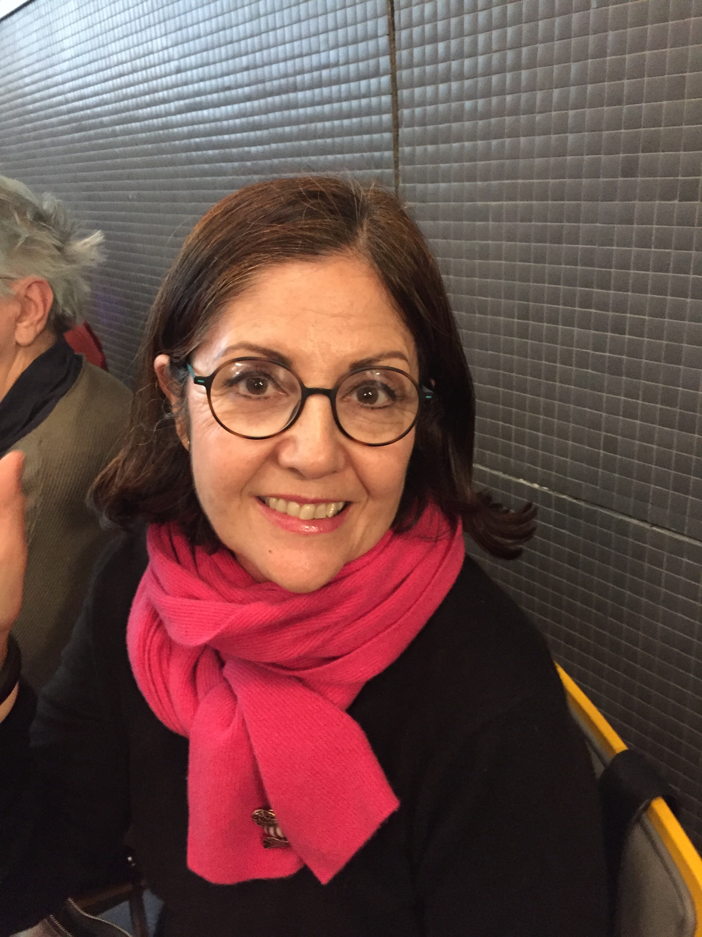 En la asamblea MAV 2018